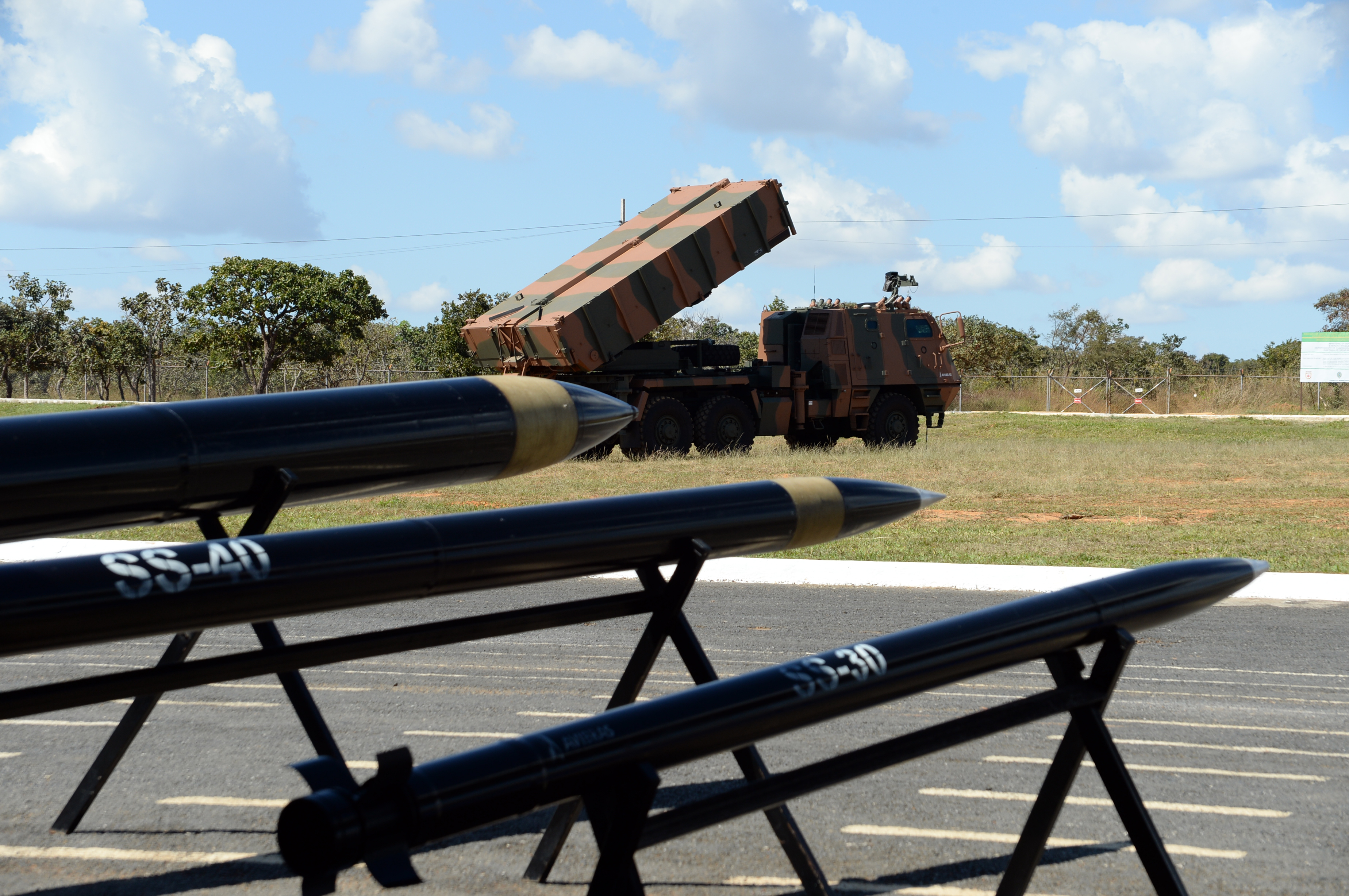 06/06/2014, Formosa - GO Fotos: Jorge Cardoso